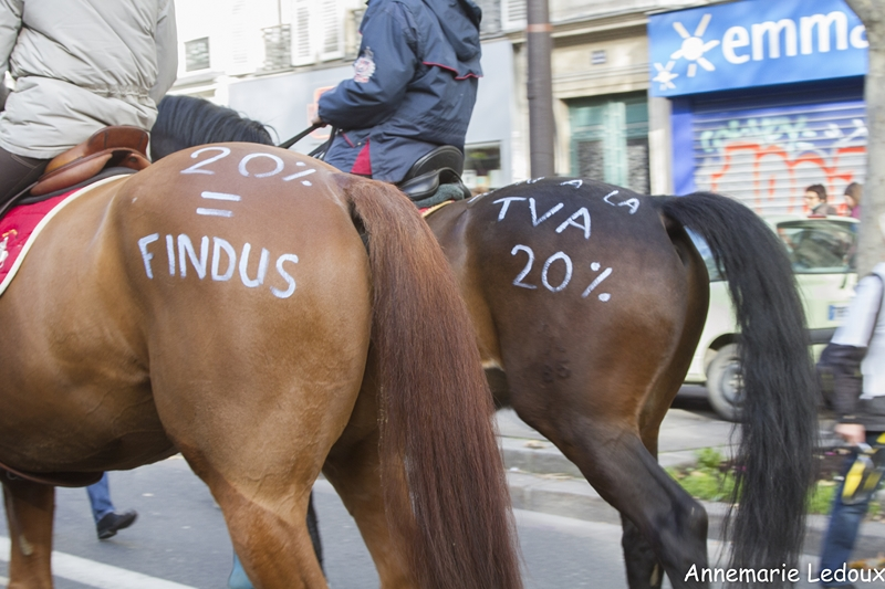 Photographie prise lors de la manifestation anti Equitaxe du 11/11/2013 à Paris